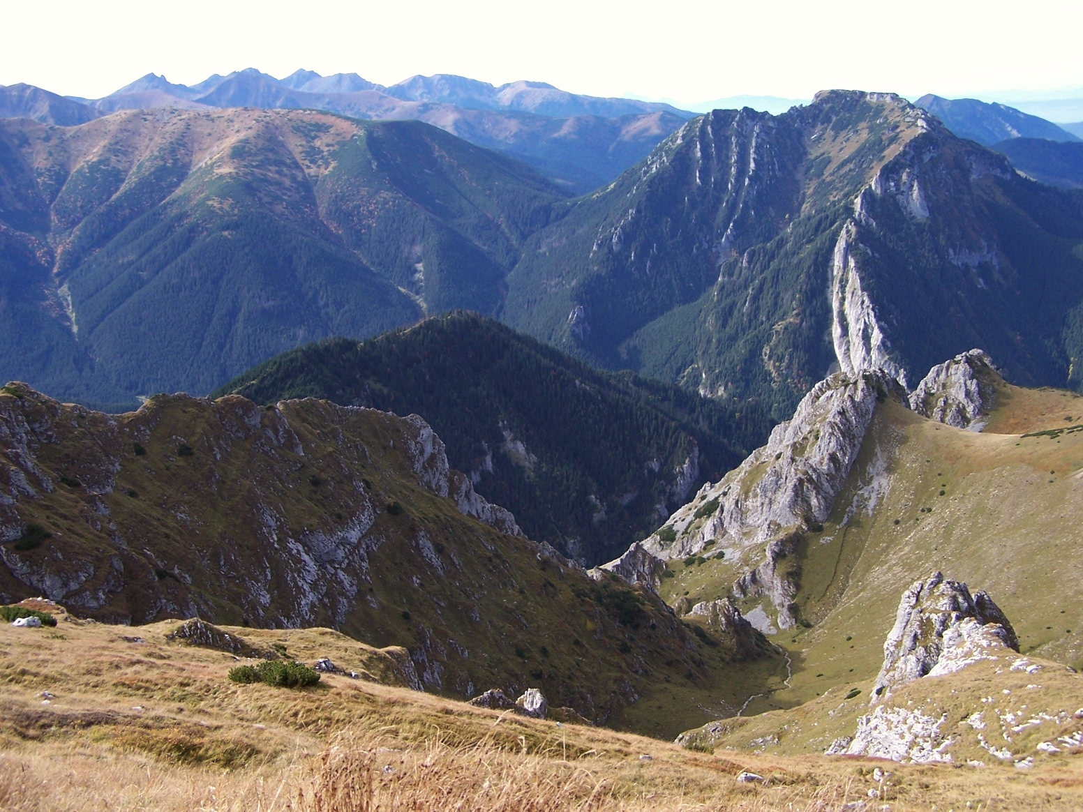 West Tatry (widok z Czerwonych Wierchów)